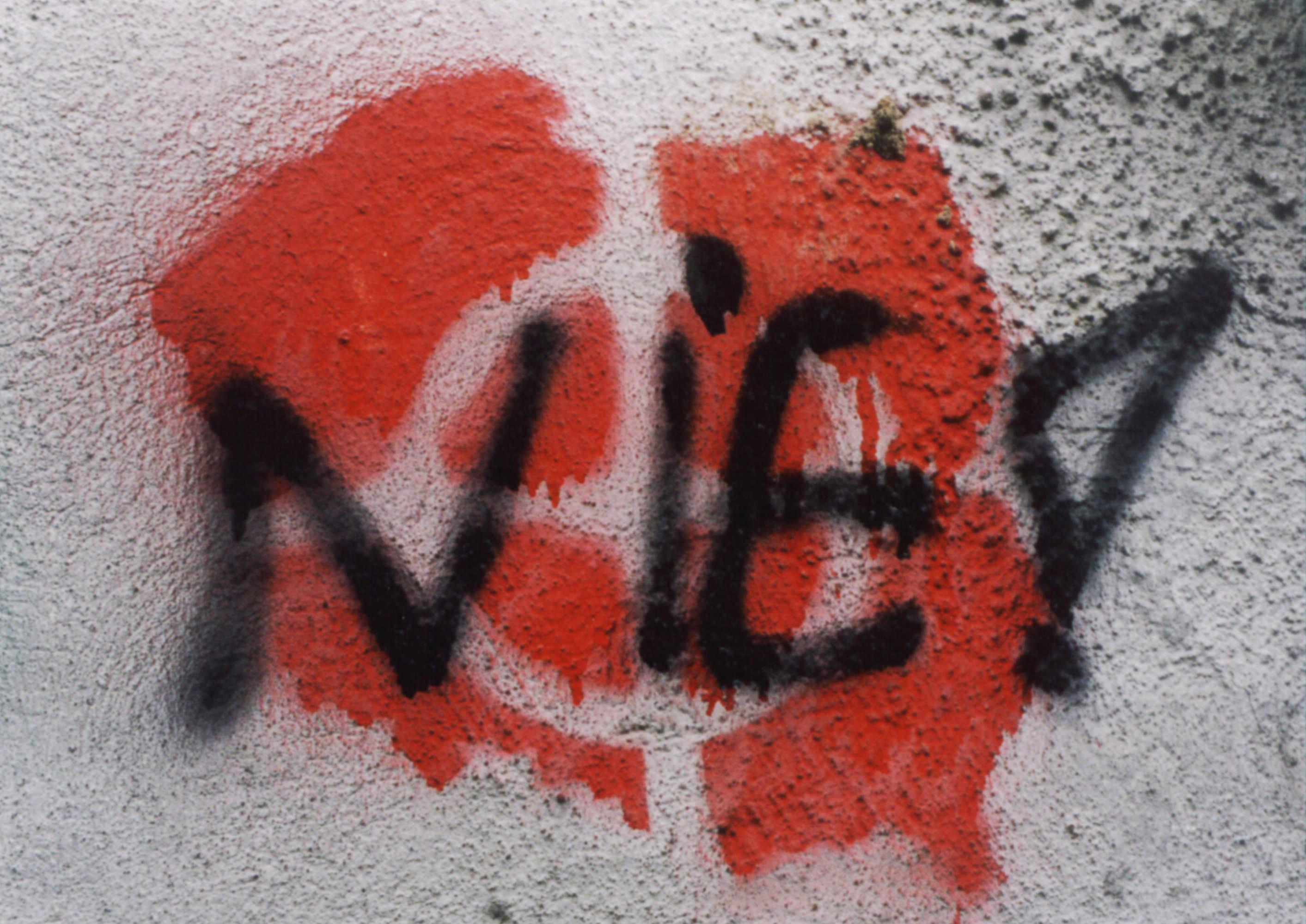 Graffiti znalezione w Częstochowie w 2002 roku, przykład wojny na murach